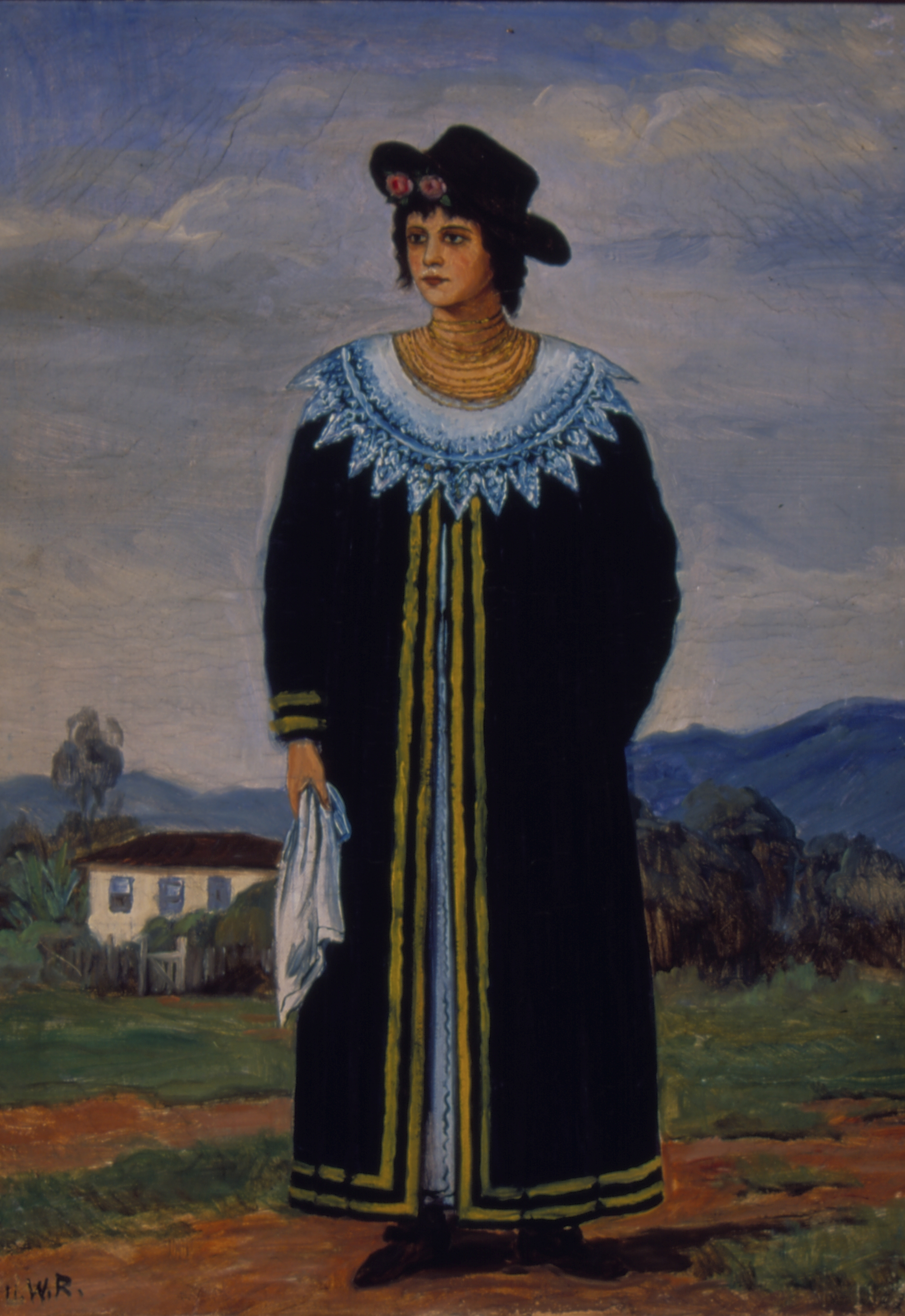 Obra que integra o acervo do Museu Paulista da USP. Coleção José Wasth Rodrigues - CJWR